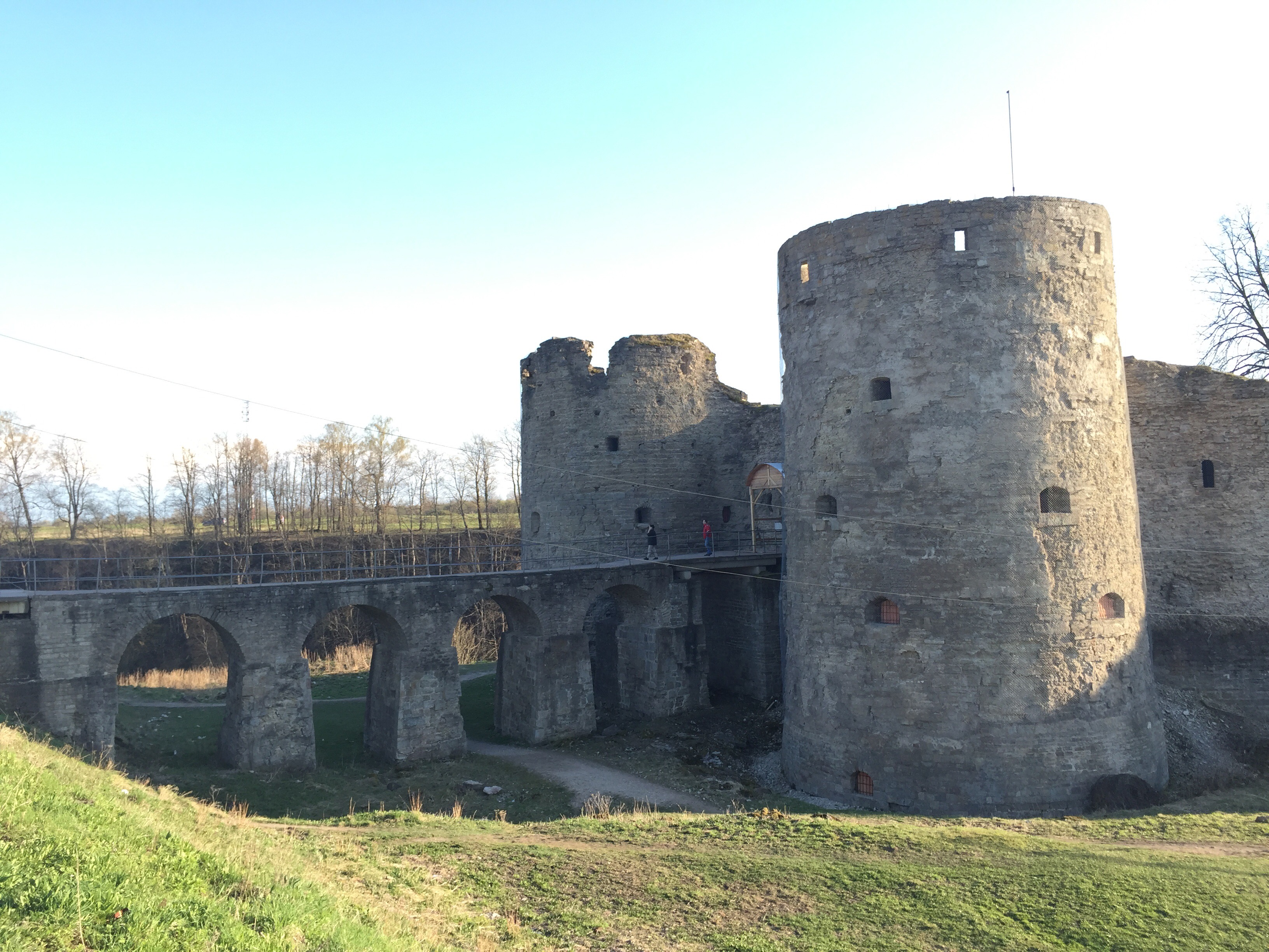 крепость Копорье